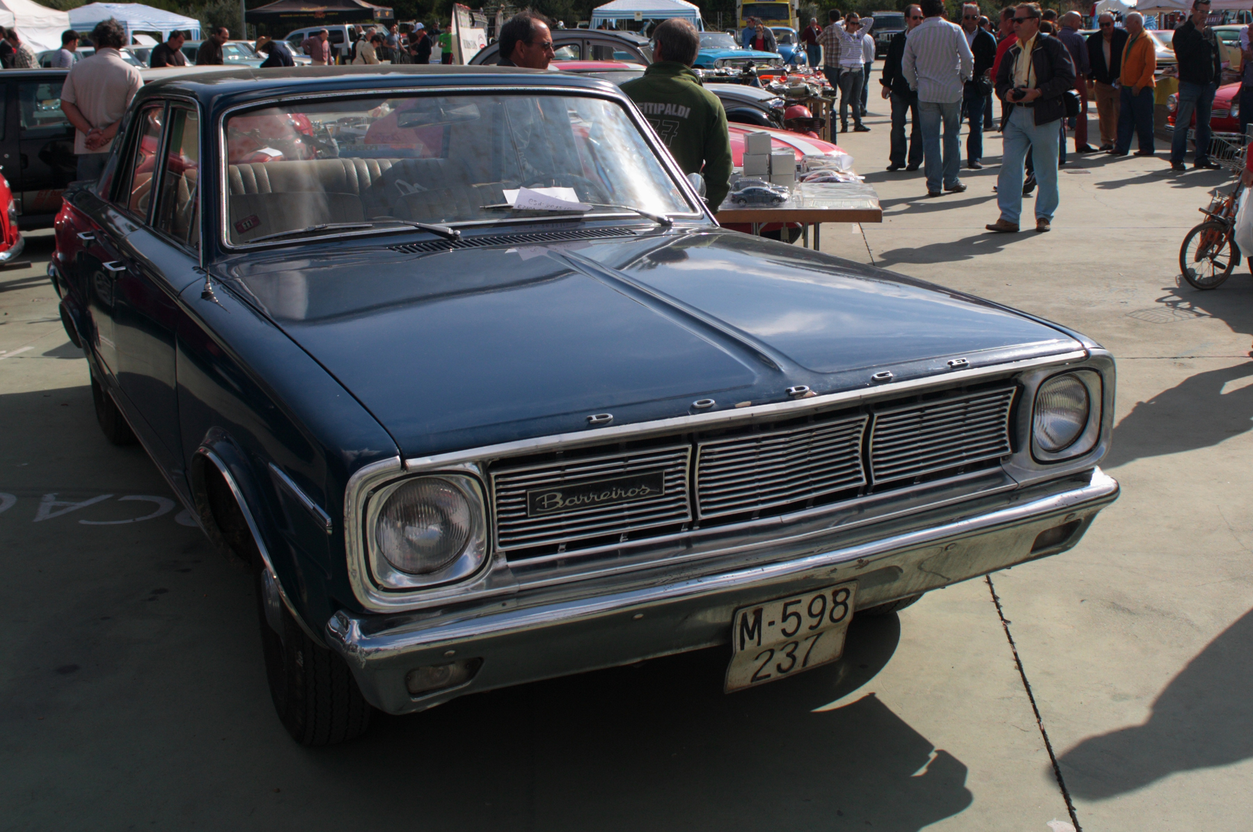 Barreiros-Dodge Feria de Vehículos Clásicos Populares Recinto Ferial de Guadalajara Guadalajara Provincia de Guadalajara Castilla-La Mancha España